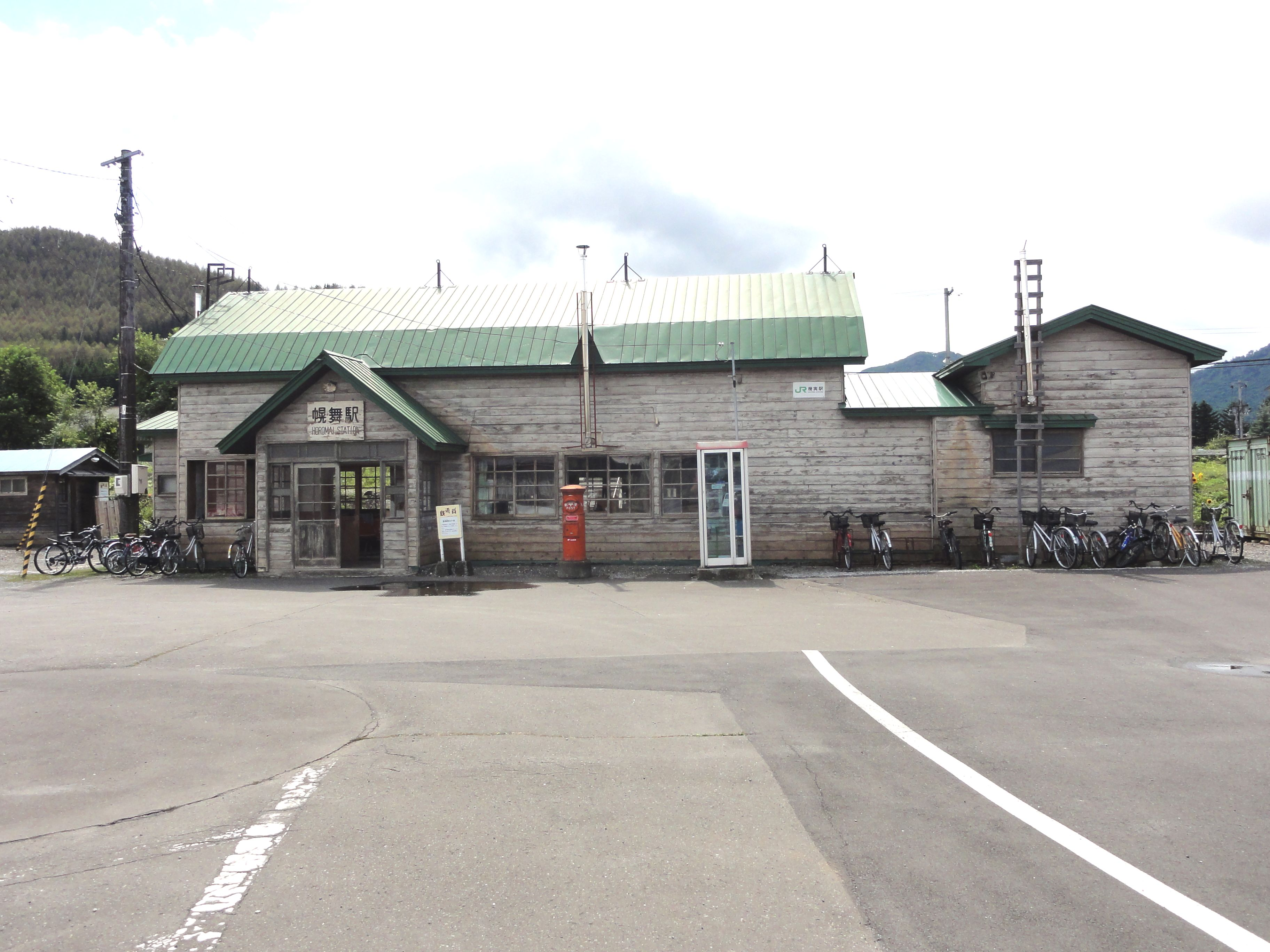 映画『鉄道員』に「幌舞駅」として登場した幾寅駅駅舎